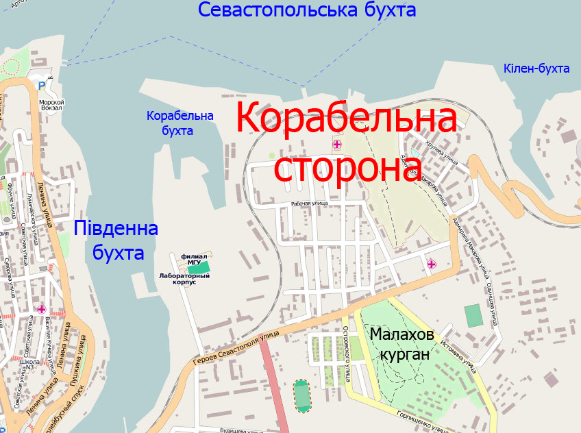 Корабельна сторона